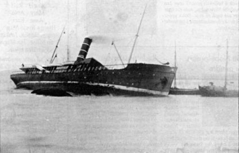 DS «Astræa» (kallesignal JPLC) var et hurtigruteskip som ble overlevert Det Bergenske Dampskibsselskab (BDS) i august 1900. Skipet var byggnummer 191 ved Akers mekaniske verksted i Kristiania. DS «Astræa» grunnstøtte og sank ved Stabben fyr i nærheten av Florø i januar 1910.